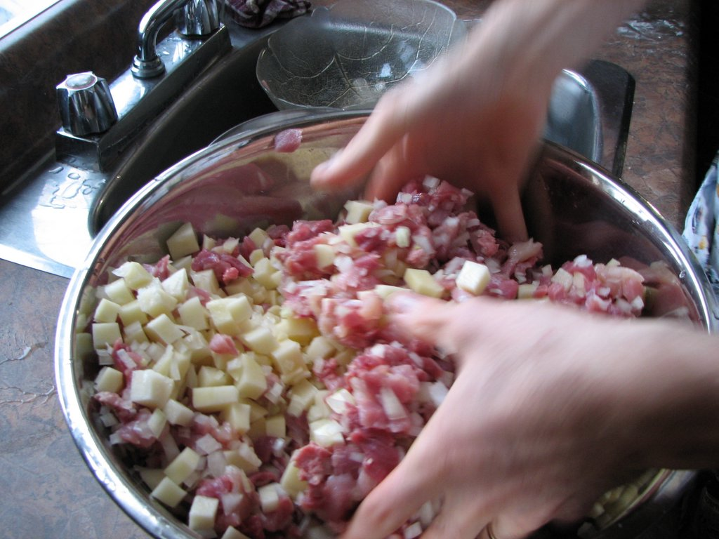 Garniture pour la tourtière du Lac Saint-Jean